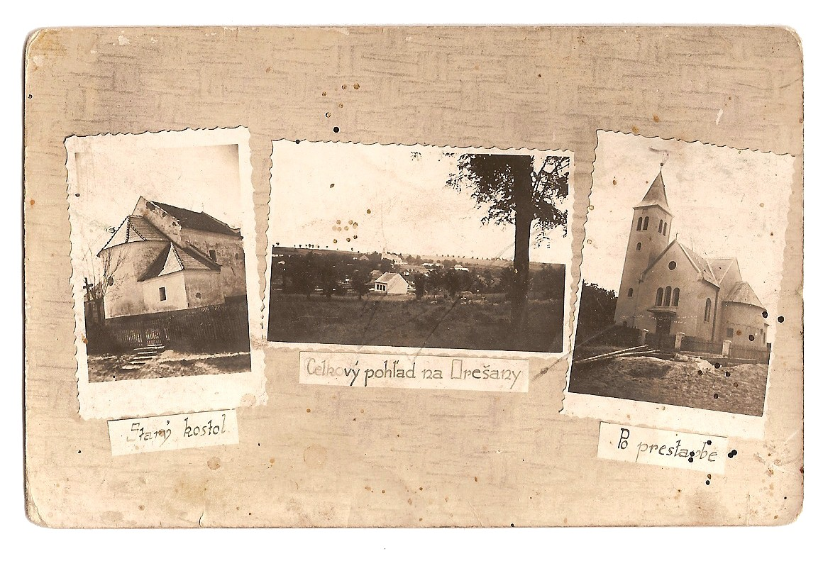 Pohľadnica dokumentujúca stav románskeho kostolíka pred radikálnou prestavbou v tridsiatych rokoch minulého storočia.